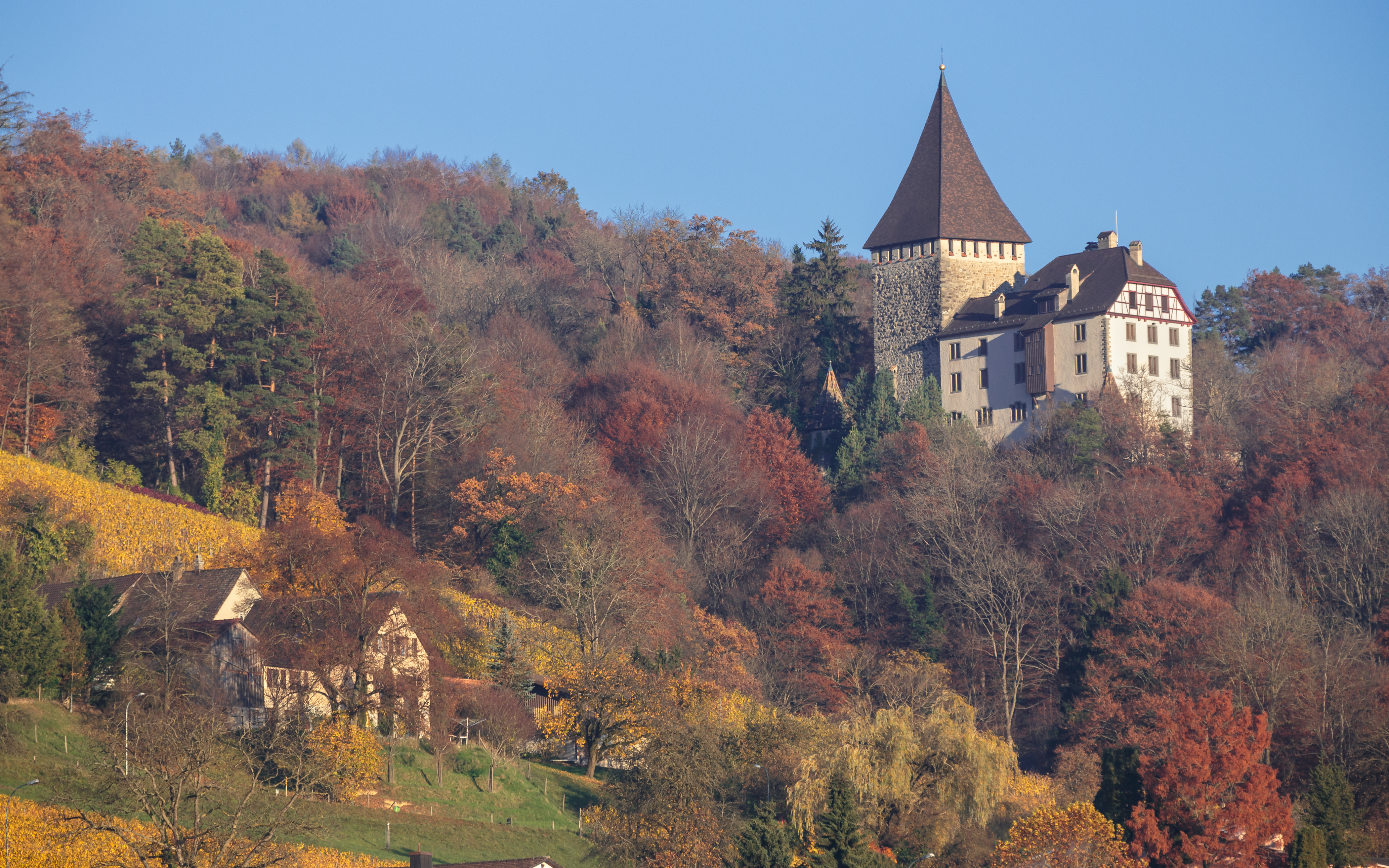 Schloss Weinfelden am Ottenberg